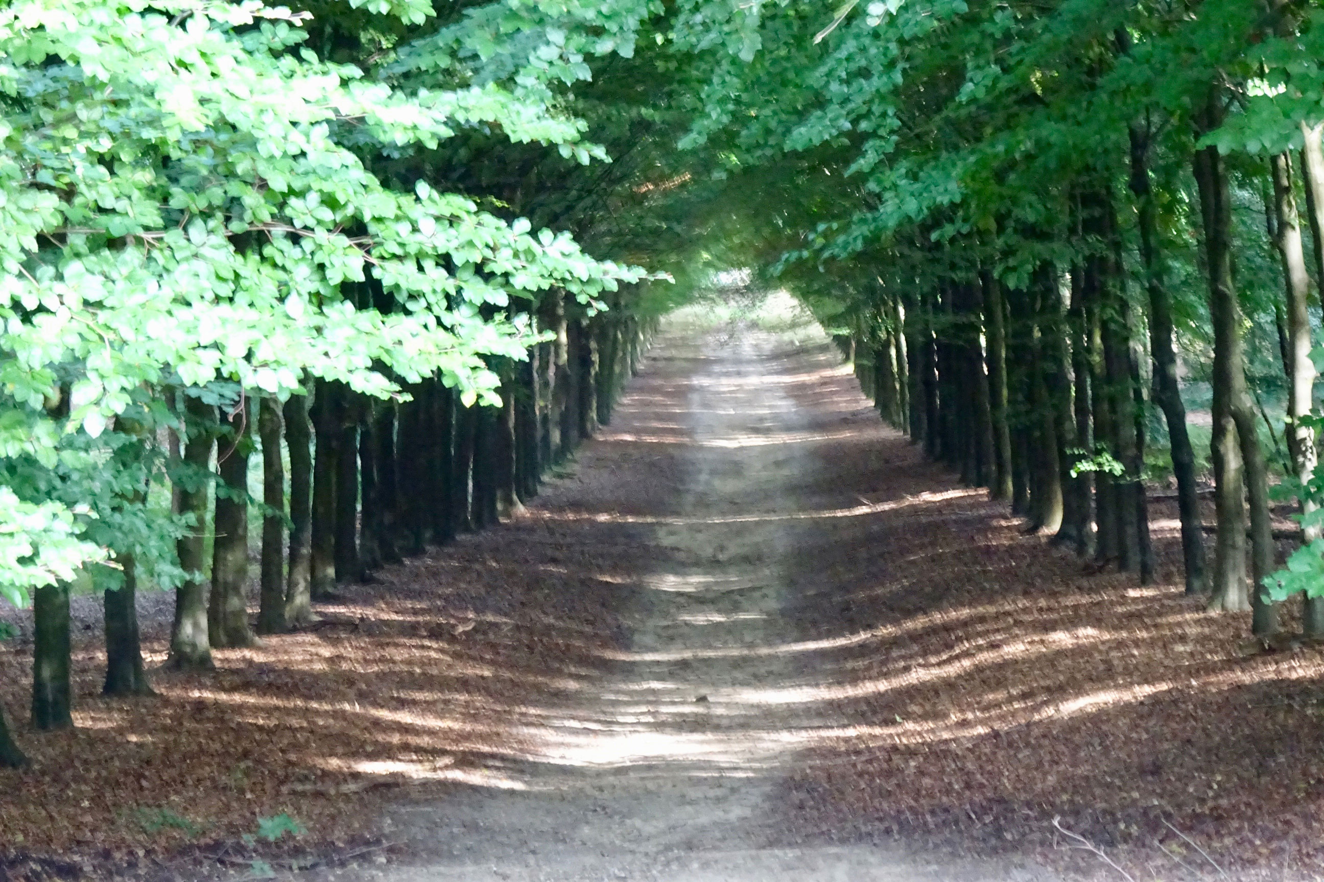 Een van de dertien wegen vanaf de Carolinaberg in het Hof te Dieren nabij Dieren